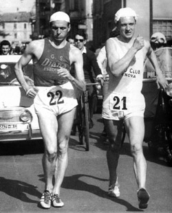 Abdon Pamich (21) and Pino Dordoni (22) racing at the 1961 Coppa Città di Sesto San Giovanni